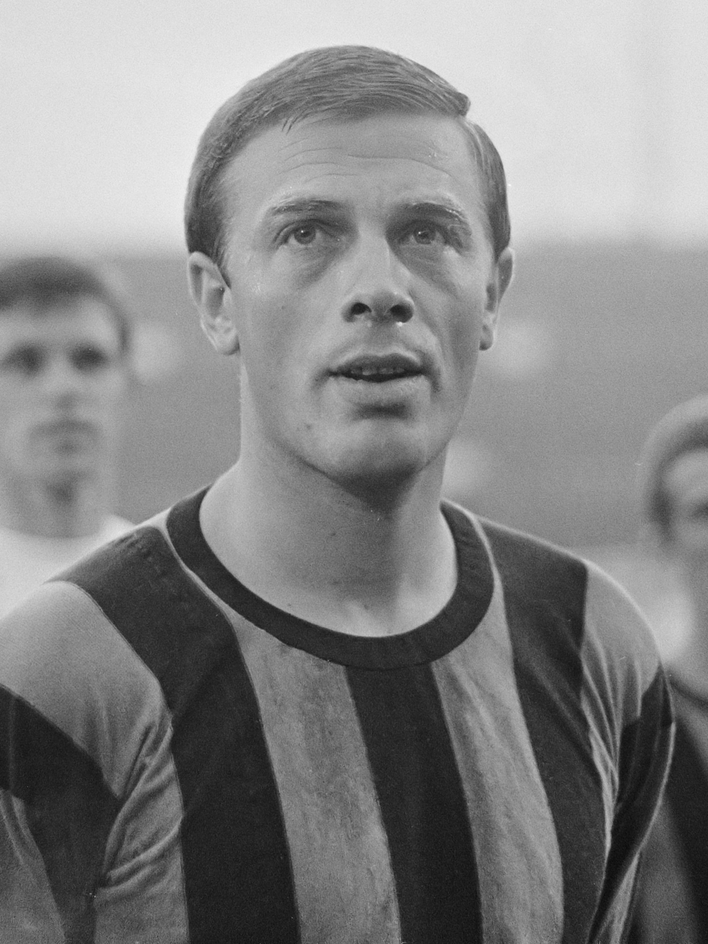 Voetbalwedstrijd D.W.S.-Charlton Atletic; uitslag 0-1, Frits Soetekouw 2 augustus 1968